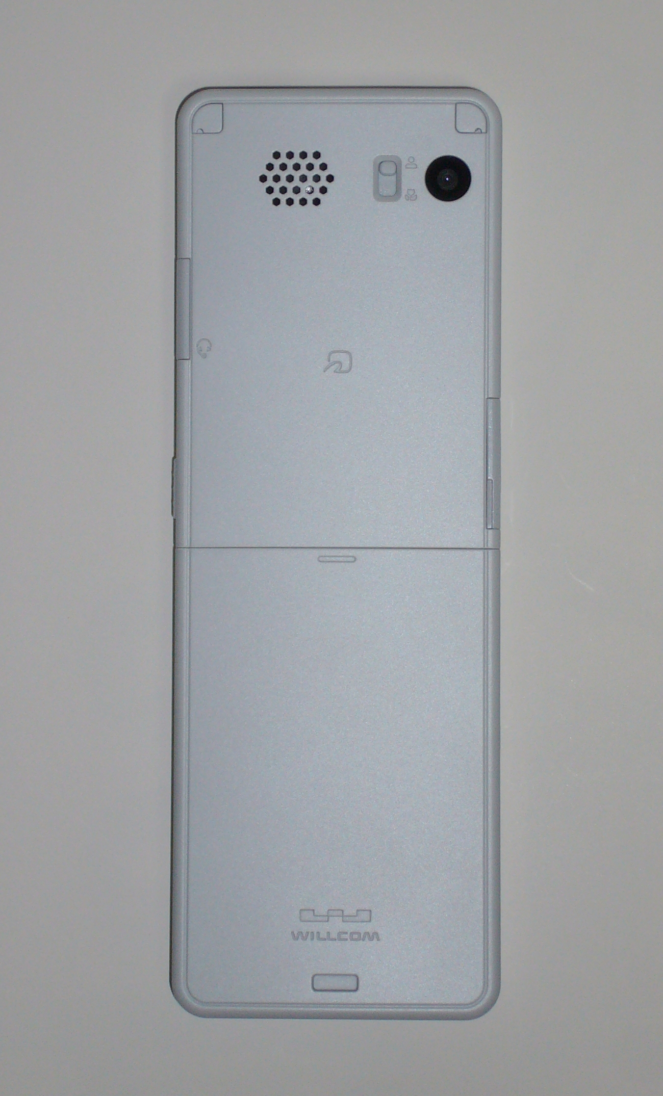 京セラより2009年に発売されたWX341Kの背面画像。